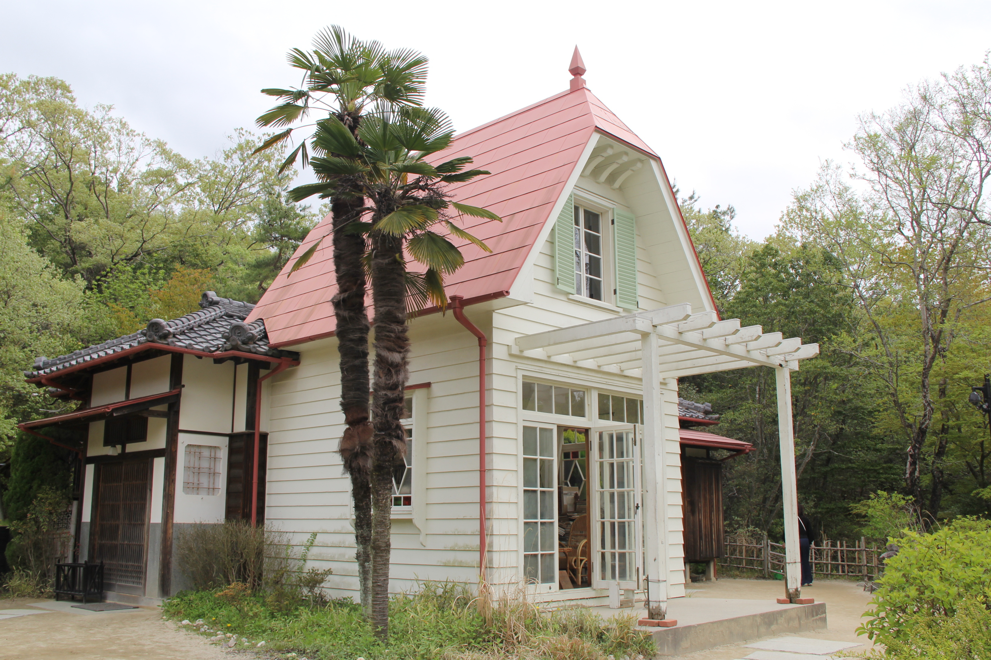 Mei and Satsuki's house